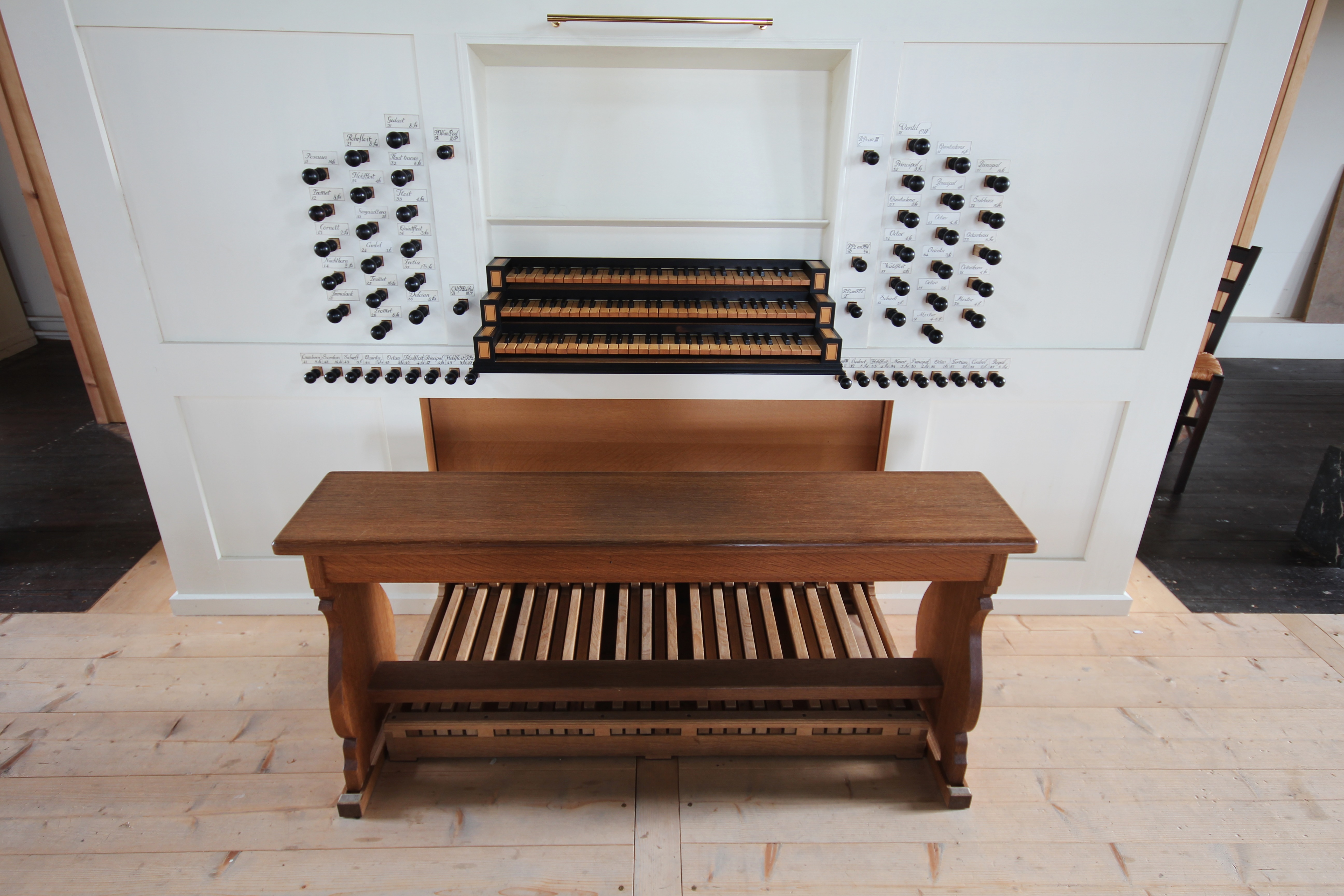 Spielanlage der Orgel der Großen Kirche zu Leer, Ostfriesland